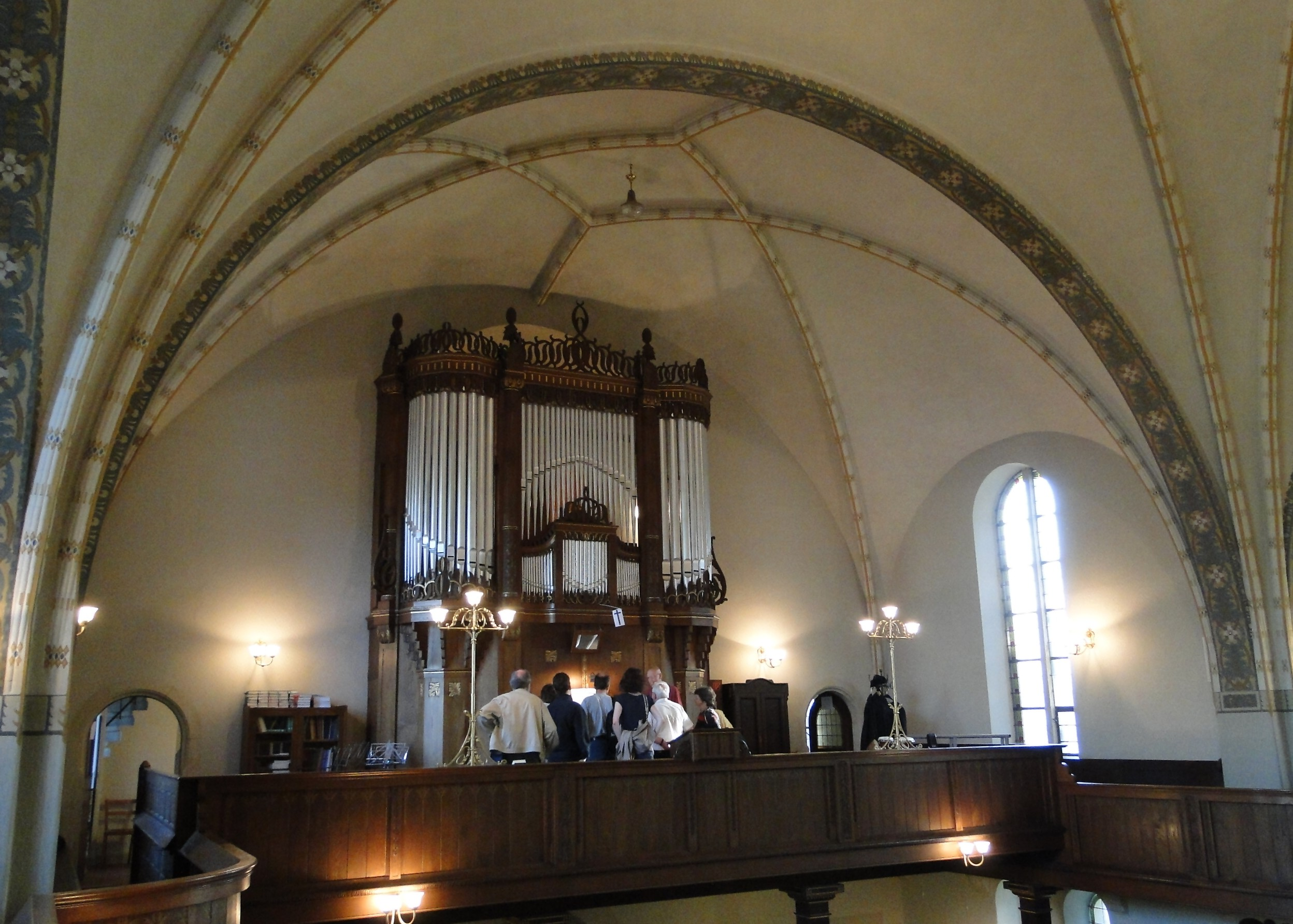 Orgelempore mit Jehmlich-Orgel der Christuskirche Dresden-Klotzsche